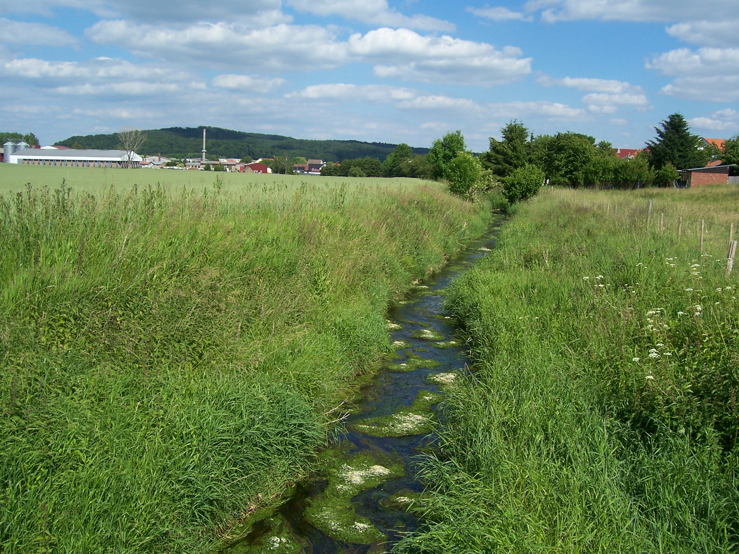 Die Bode in Bischofferode